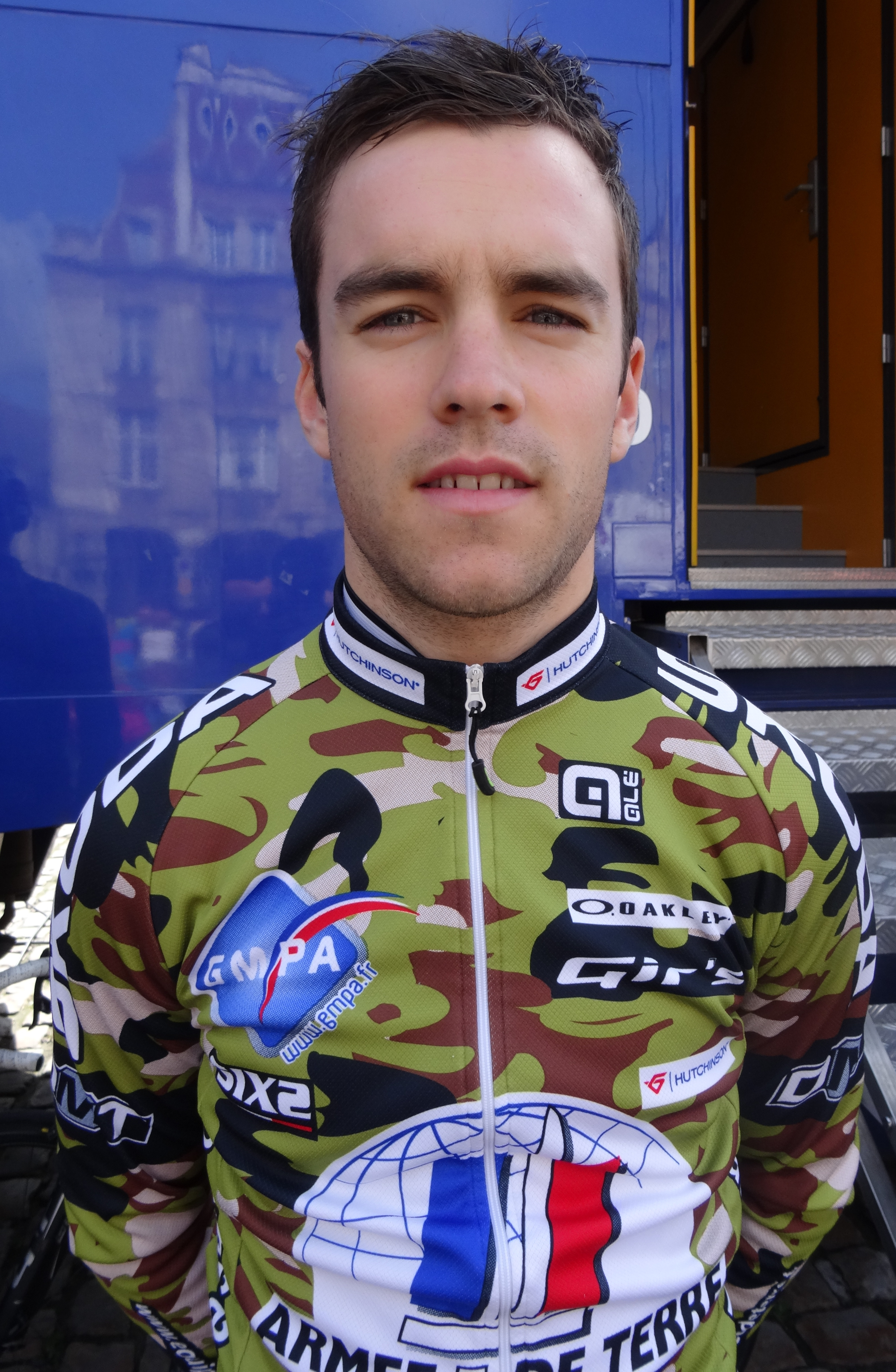 Reportage photographique réalisé le dimanche 25 mai 2014 à l'occasion du départ et de l'arrivée de la troisième étape du Paris-Arras Tour 2014 à Arras, Pas-de-Calais, Nord-Pas-de-Calais, France. Depicted person: Romain Le Roux